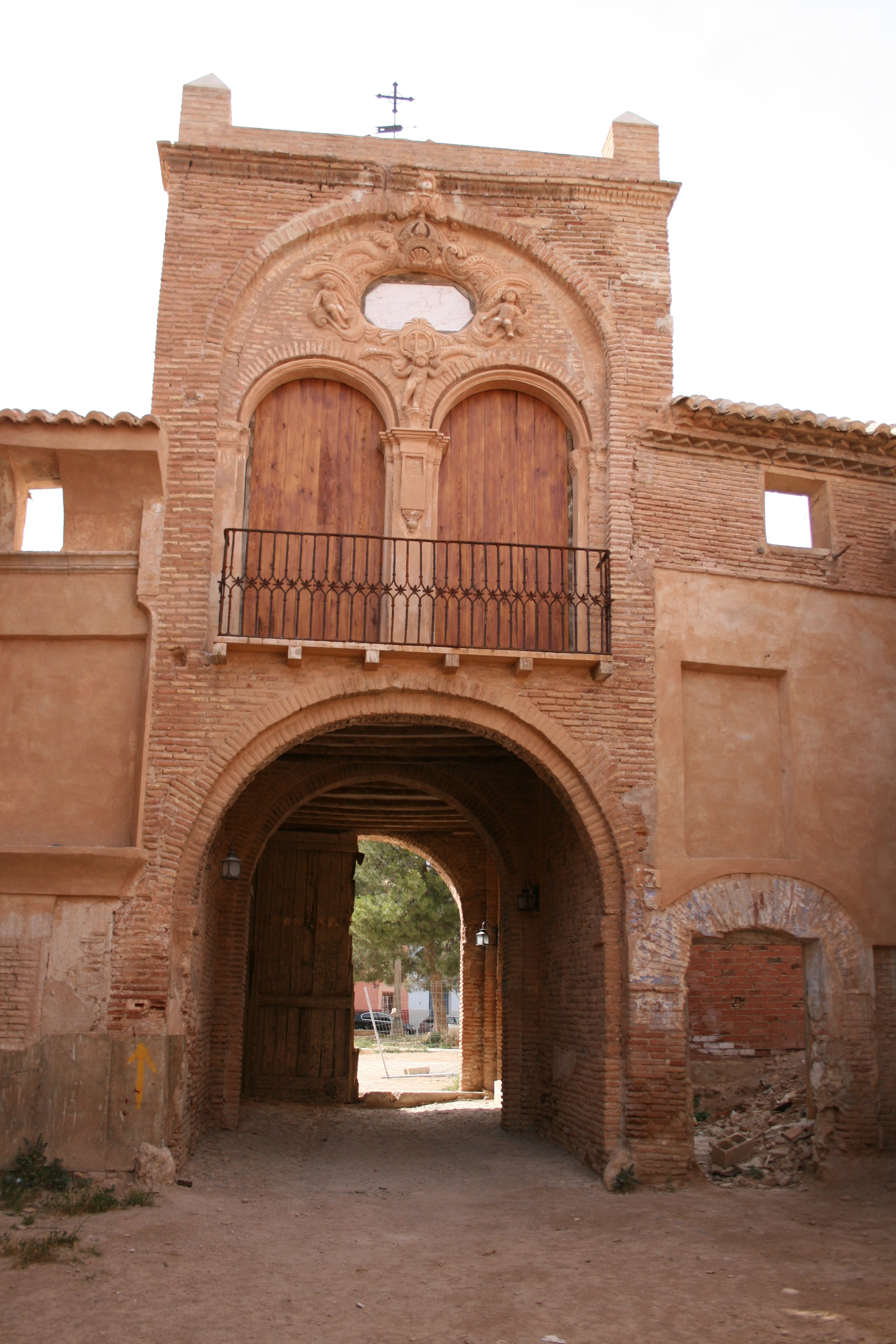 Belchite - Arco de la villa